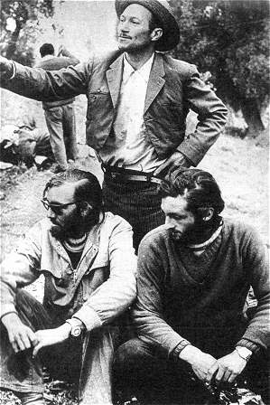 Fernando Parrado y Roberto Canessa junto al arriero Sergio Catalán, quien les encontrara perdidos en las montañas de los Andes, después de diez terribles días de caminata en medio de la cordillera (tragedia y milagro de los Andes).